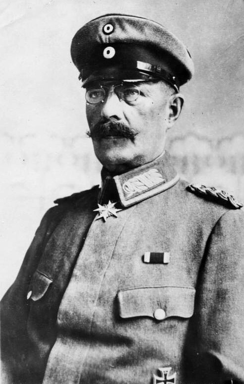 Generalleutnant Hermann Freiherr von Stein - Ein neuer Ritter d. Ordens Pour le merite